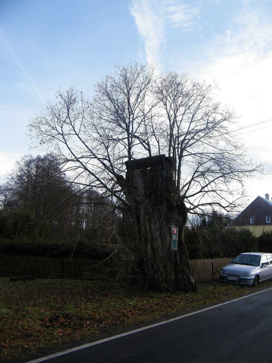 Soudní lípa v Severním, obec Lobendava